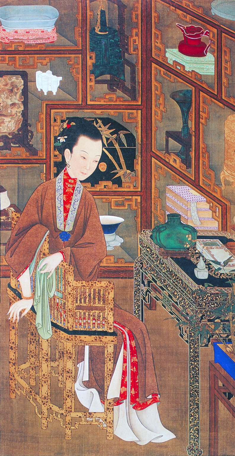 故宫博物院藏品，清《雍正十二美人图》之博古幽思